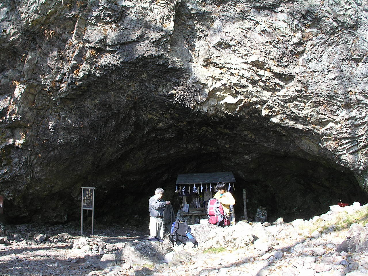 大普賢岳笙の窟